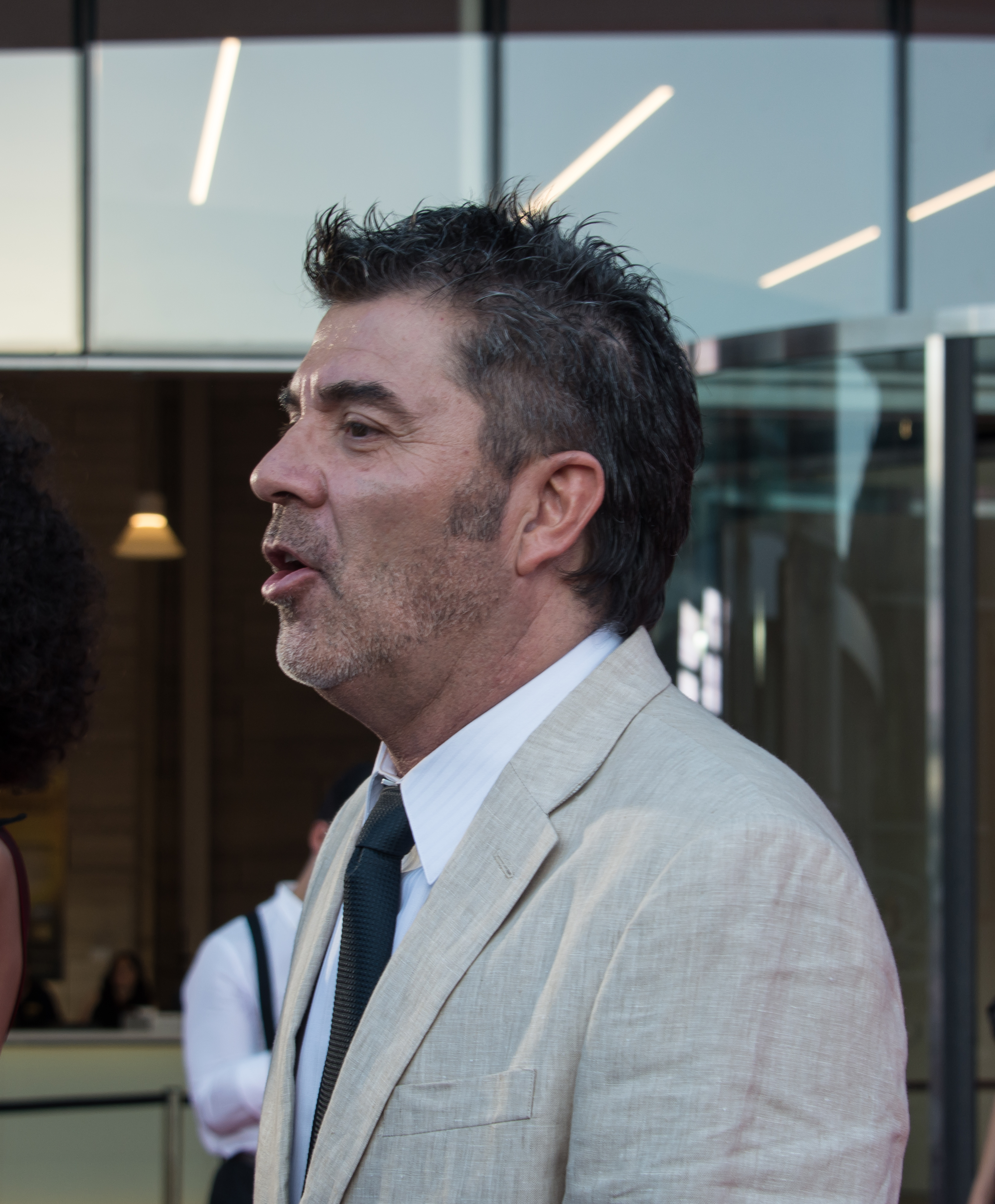 Juan Carlos Valdivia, Copihue de Oro 2018, Sun Monticello, Mostazal, Región de O'Higgins, Chile